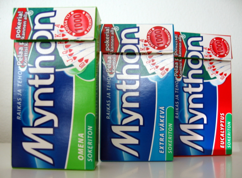 Kolme Mynthon-pastilliaskia